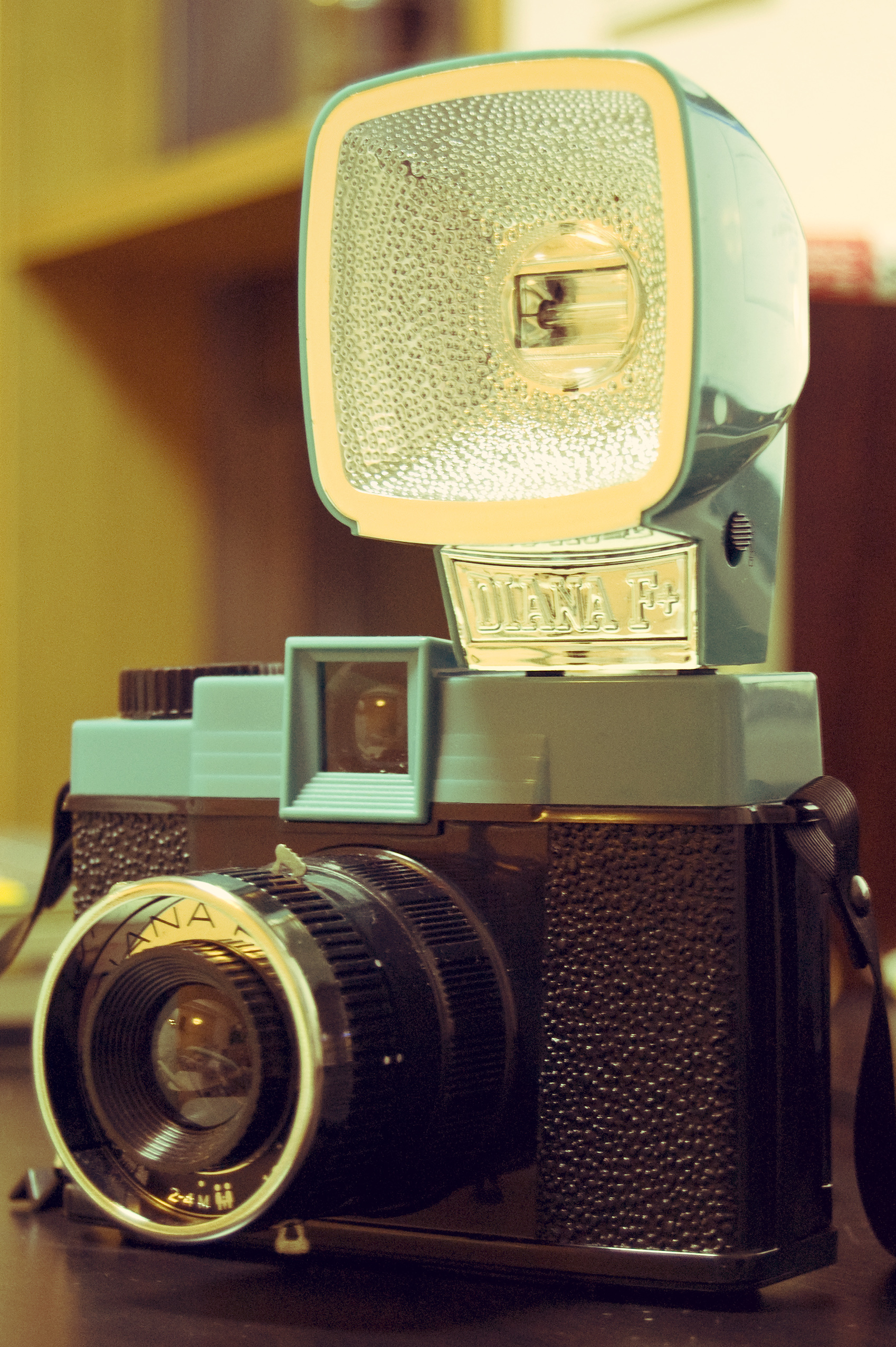 My Diana F+